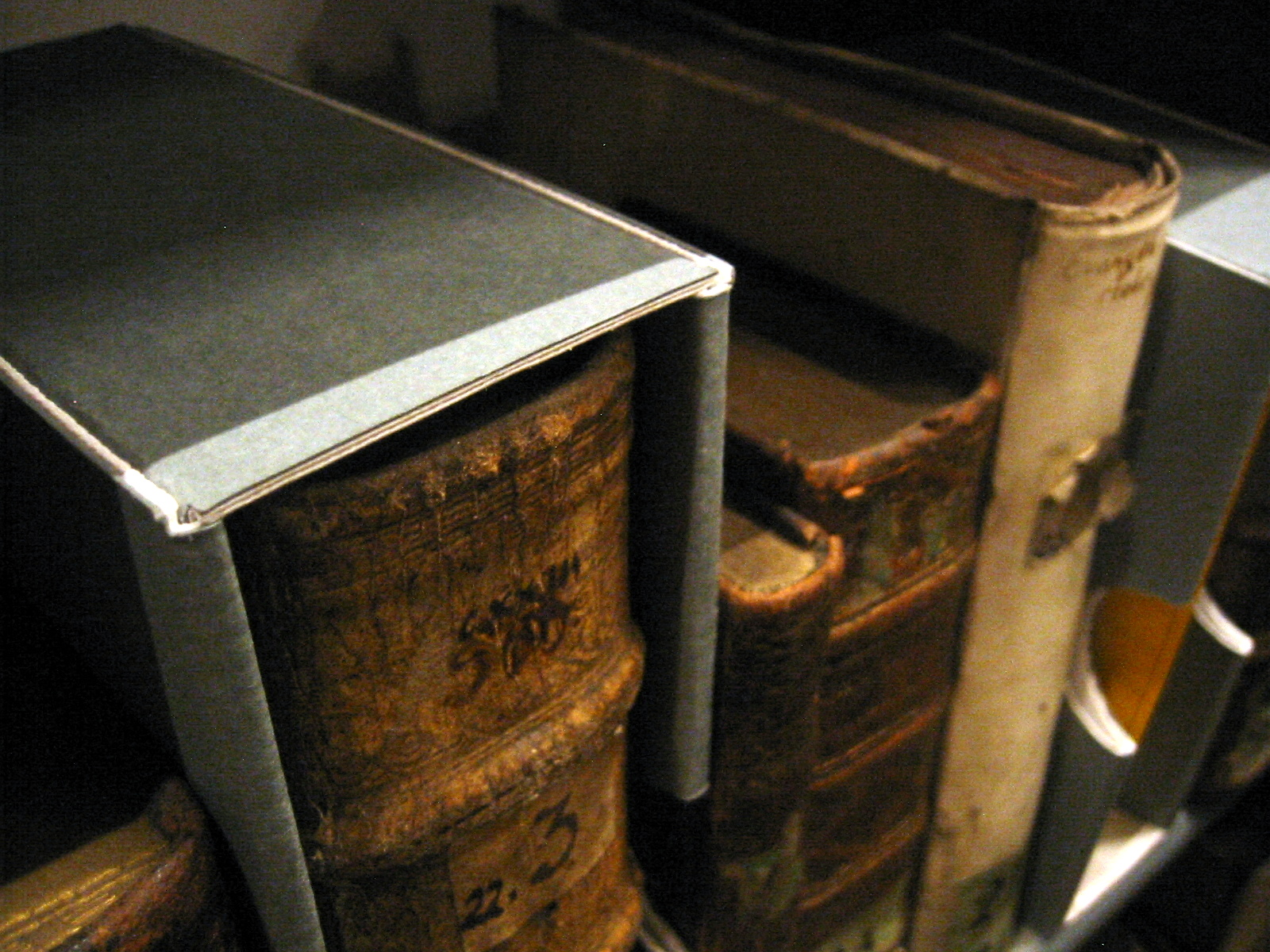 Buch in Schuber (boxing) in der Oberlausitzischen Bibliothek der Wissenschaften in Görlitz